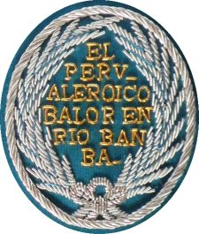 Escudo honorífico de oficial